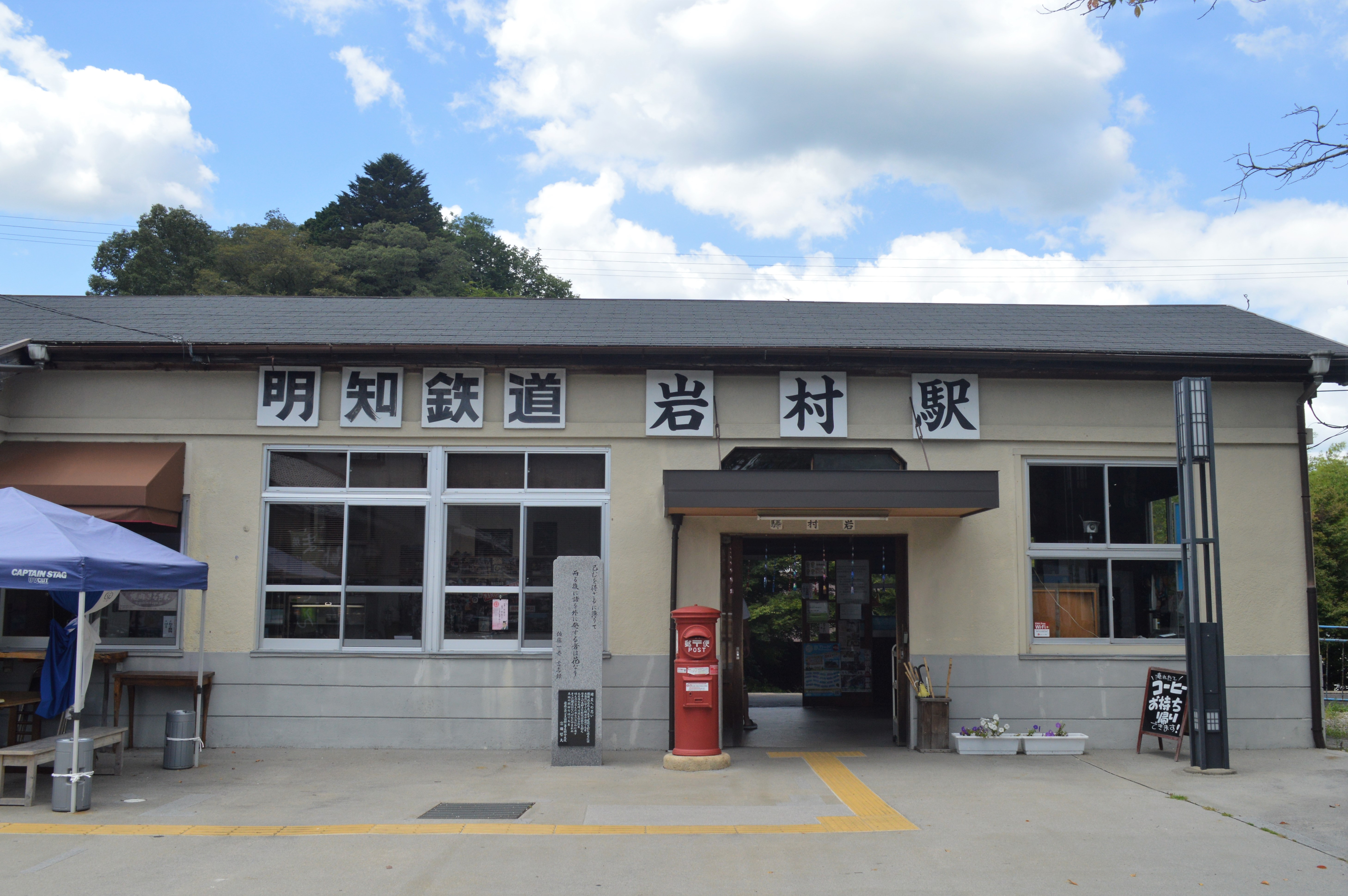 岐阜県恵那市にある明知鉄道明知線岩村駅。